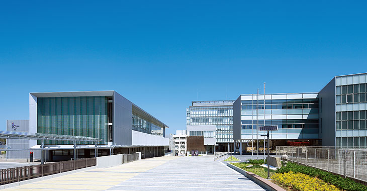 愛知淑徳大学 長久手キャンパス